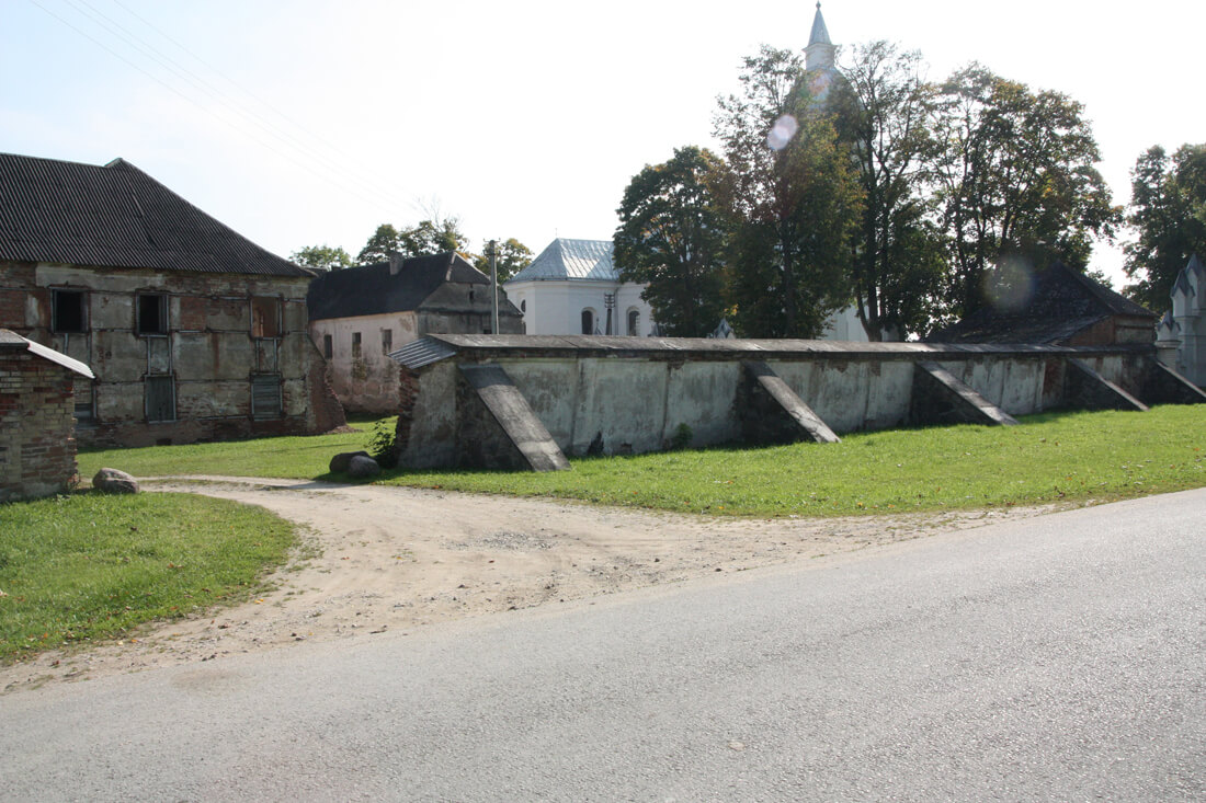 Vienuolyno ansamblis